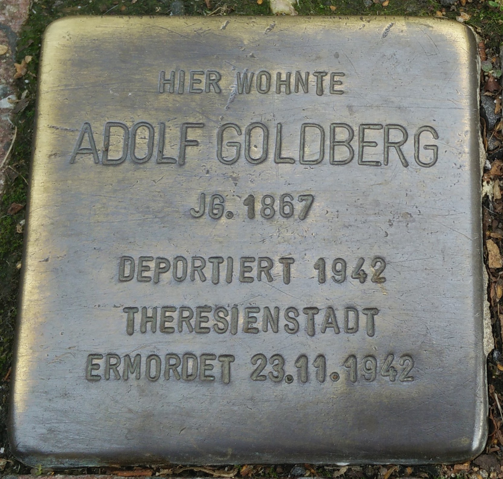 Bad Vilbel, Stolperstein Adolf Goldberg